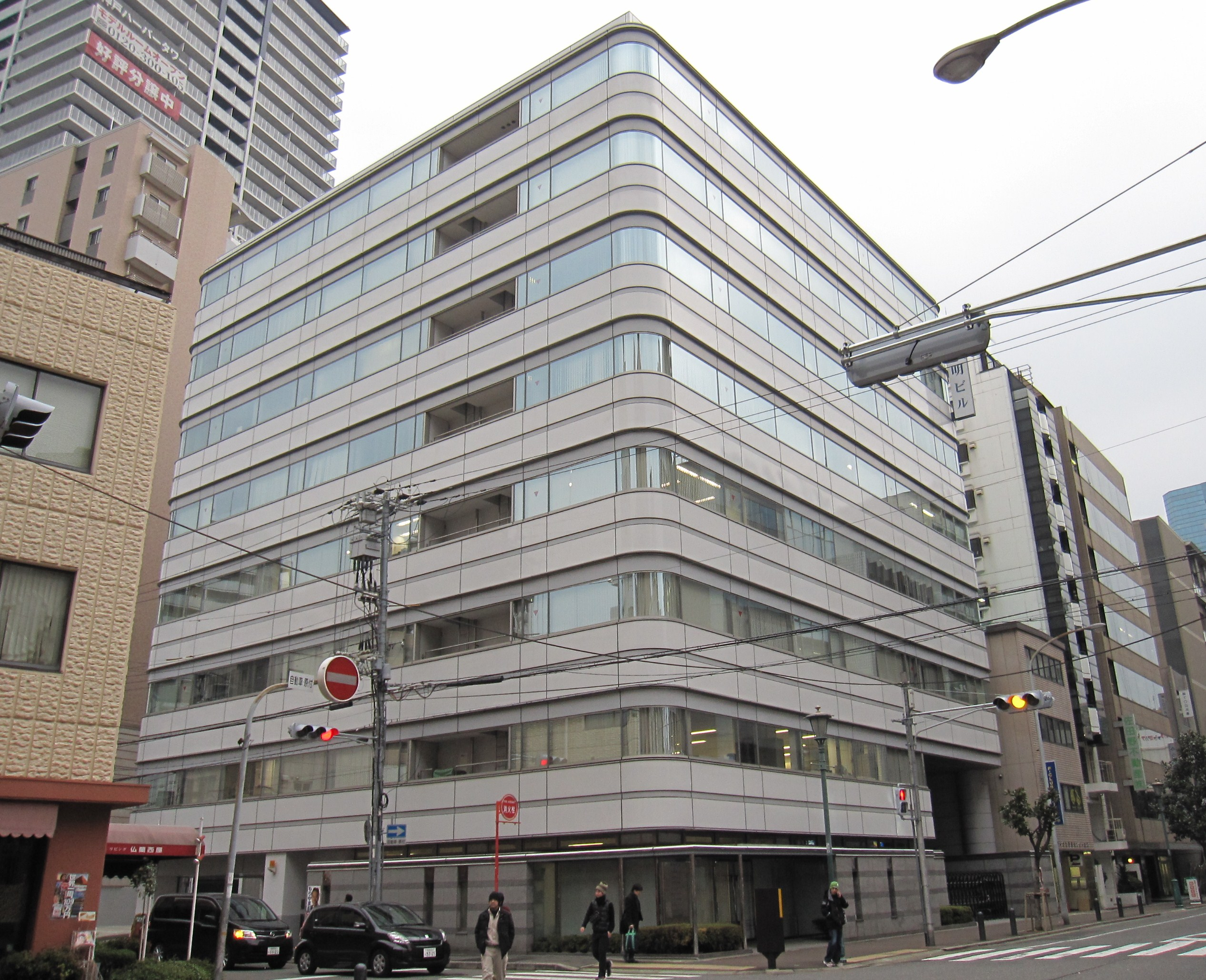 神明本社ビル